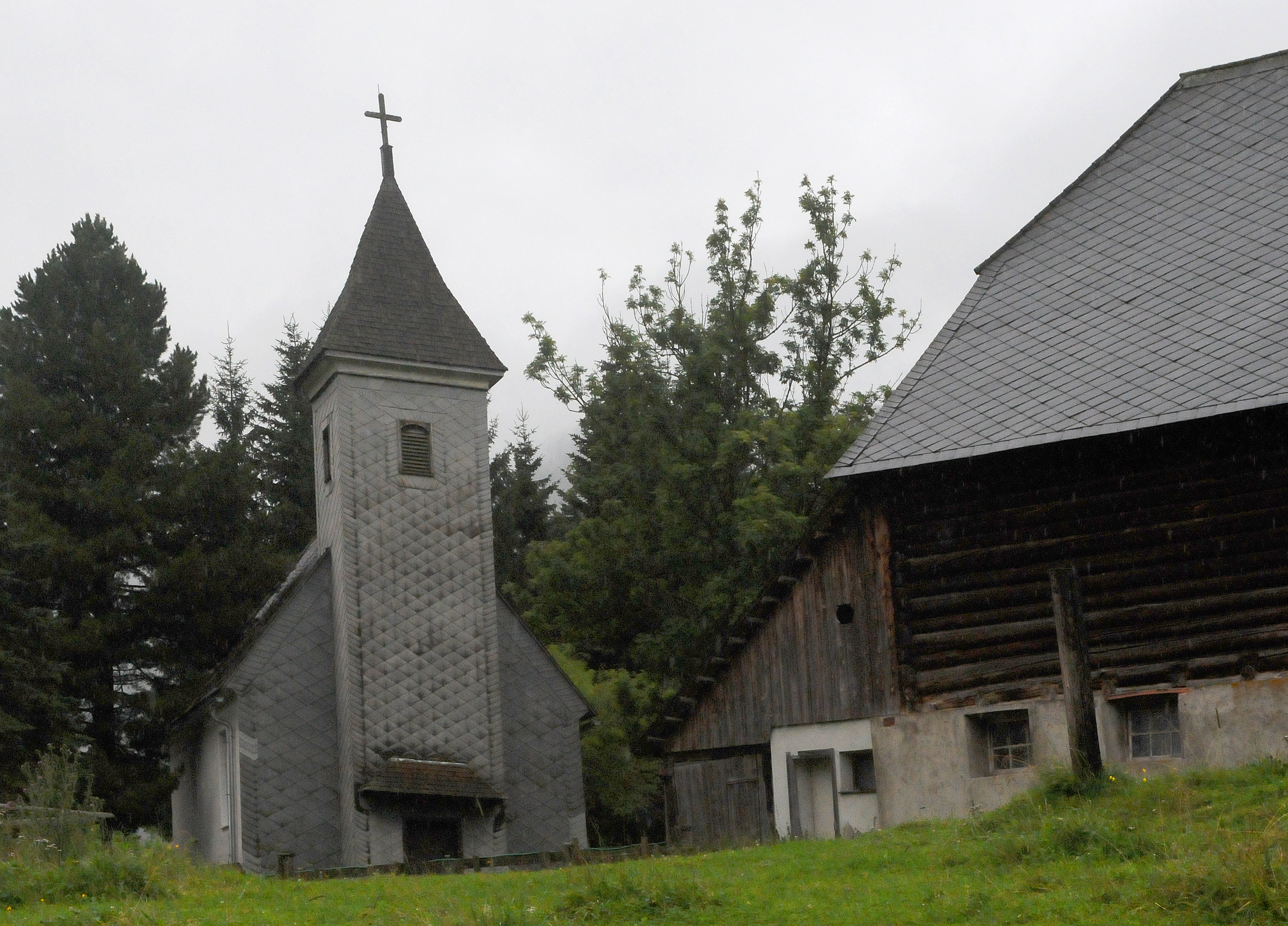 Glaubenskirche Sankt Johann mit Schullerer Hof